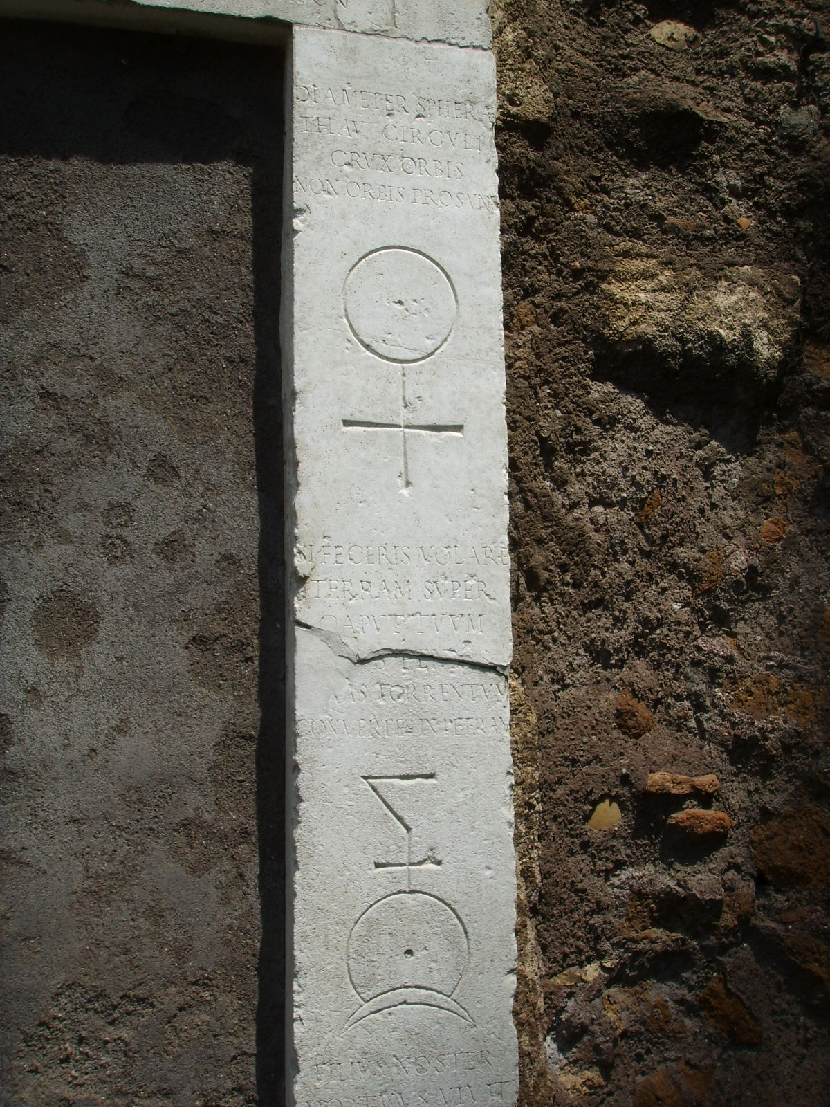 Magic gate (Porta magica) in Piazza Vittorio Emanuele, in Rome, Italy